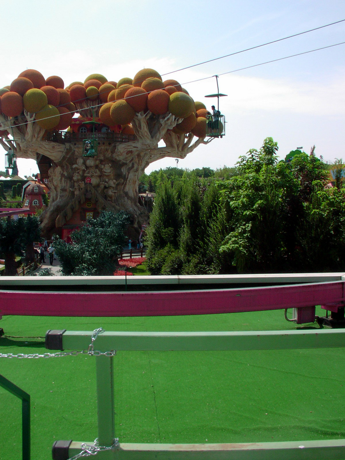 Casa di Prezzemolo, Gardaland, Italy